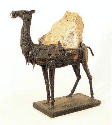 id. Szlávics László: Dromedár, hegesztett vas, kő, M 60 cm, 1989 Laszlo Szlavics Sr.: Camel, welded iron, stone, 60 cm, 1989